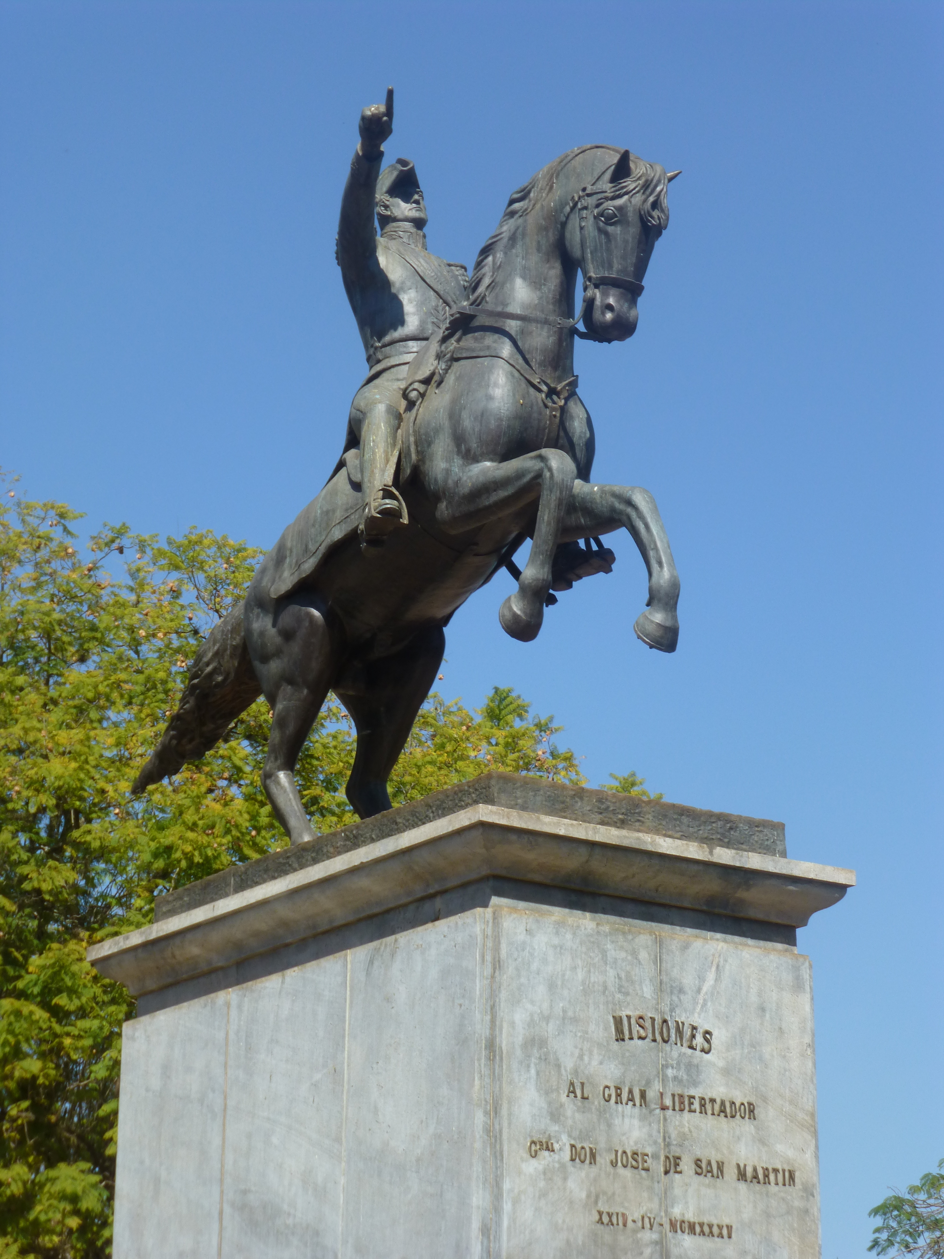 Estatua del Libertador Don José de San Martín, en la Plaza San Martín de la ciudad de Posadas.